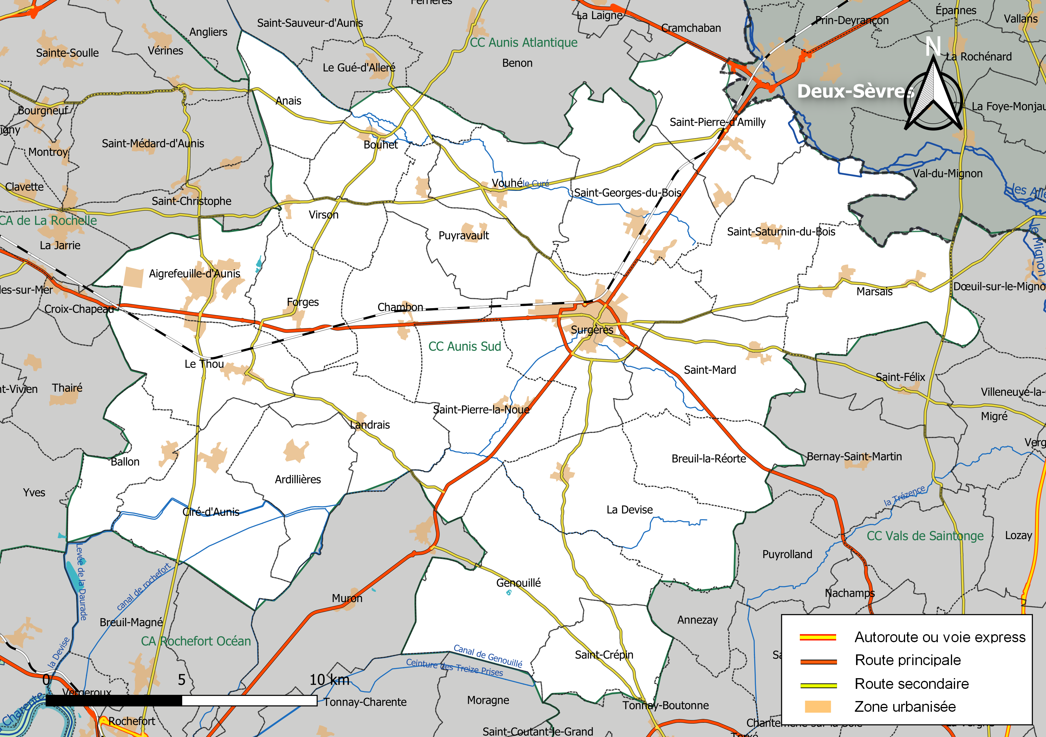 Carte géographique de la Communauté de communes Aunis Sud, département de la Charente-Maritime, France. Composition au 1er janvier 2019.